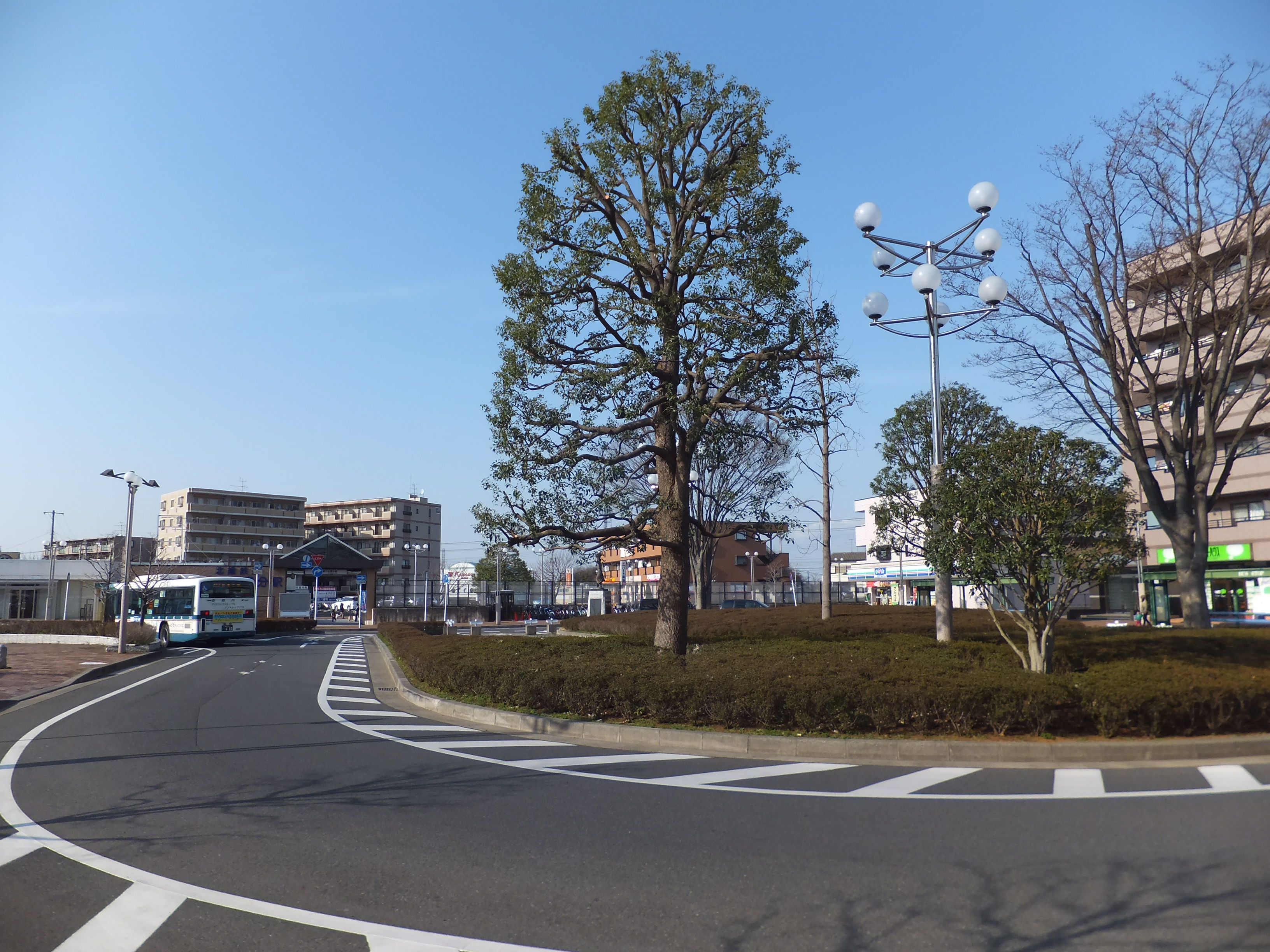 北総鉄道北国分駅、駅前ロータリー